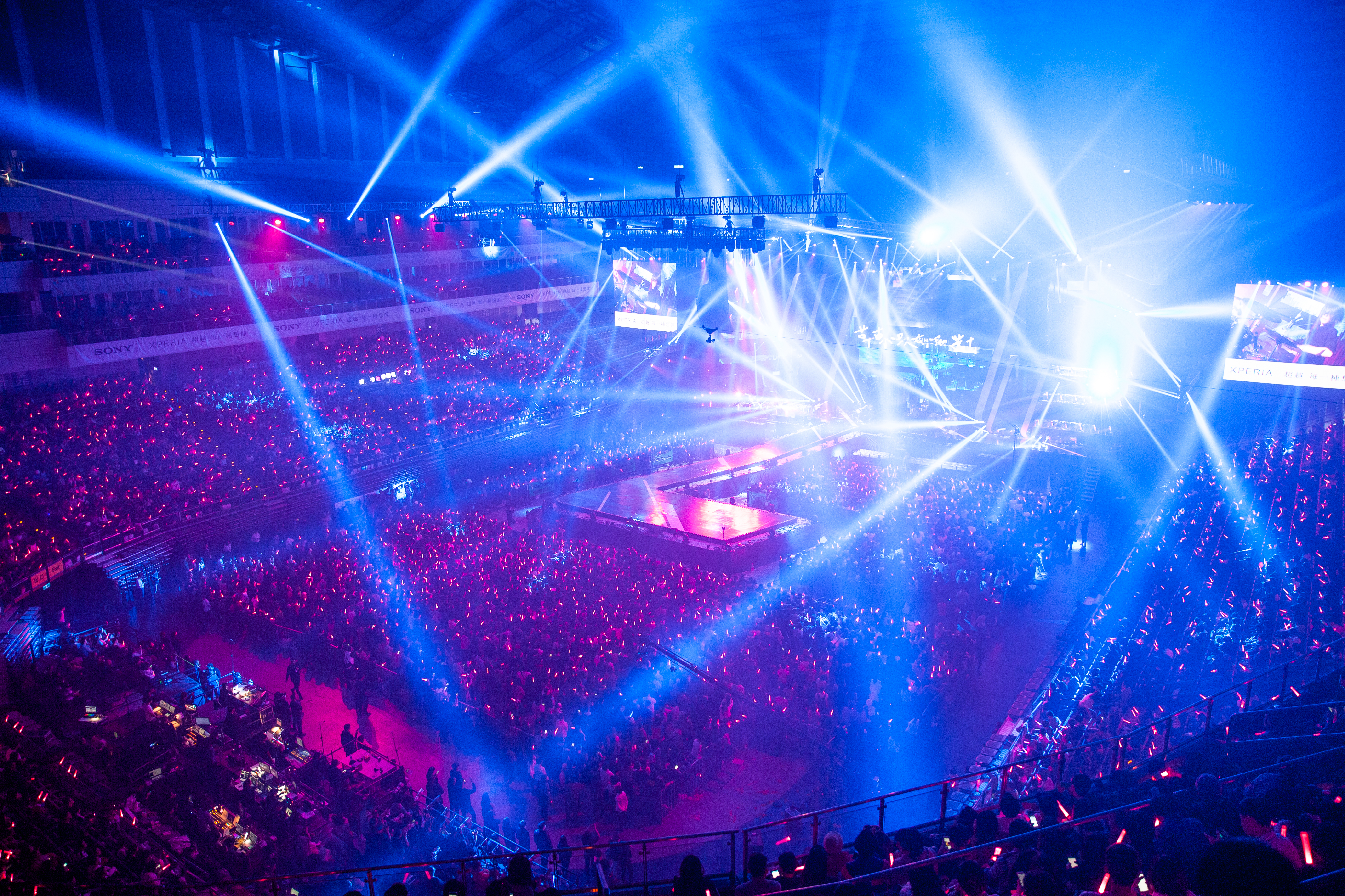 中文（台灣）: 第十二屆 KKBOX 風雲榜活動現場－小巨蛋